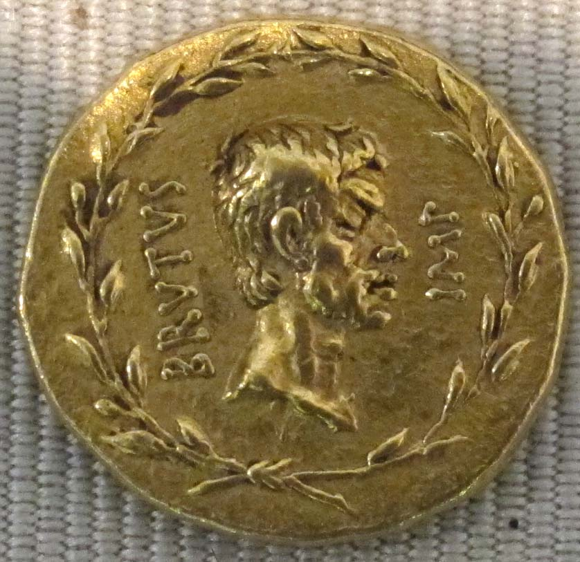 Repubblica, m. brurus imp., aureo di zecca greca, 43-42 ac.